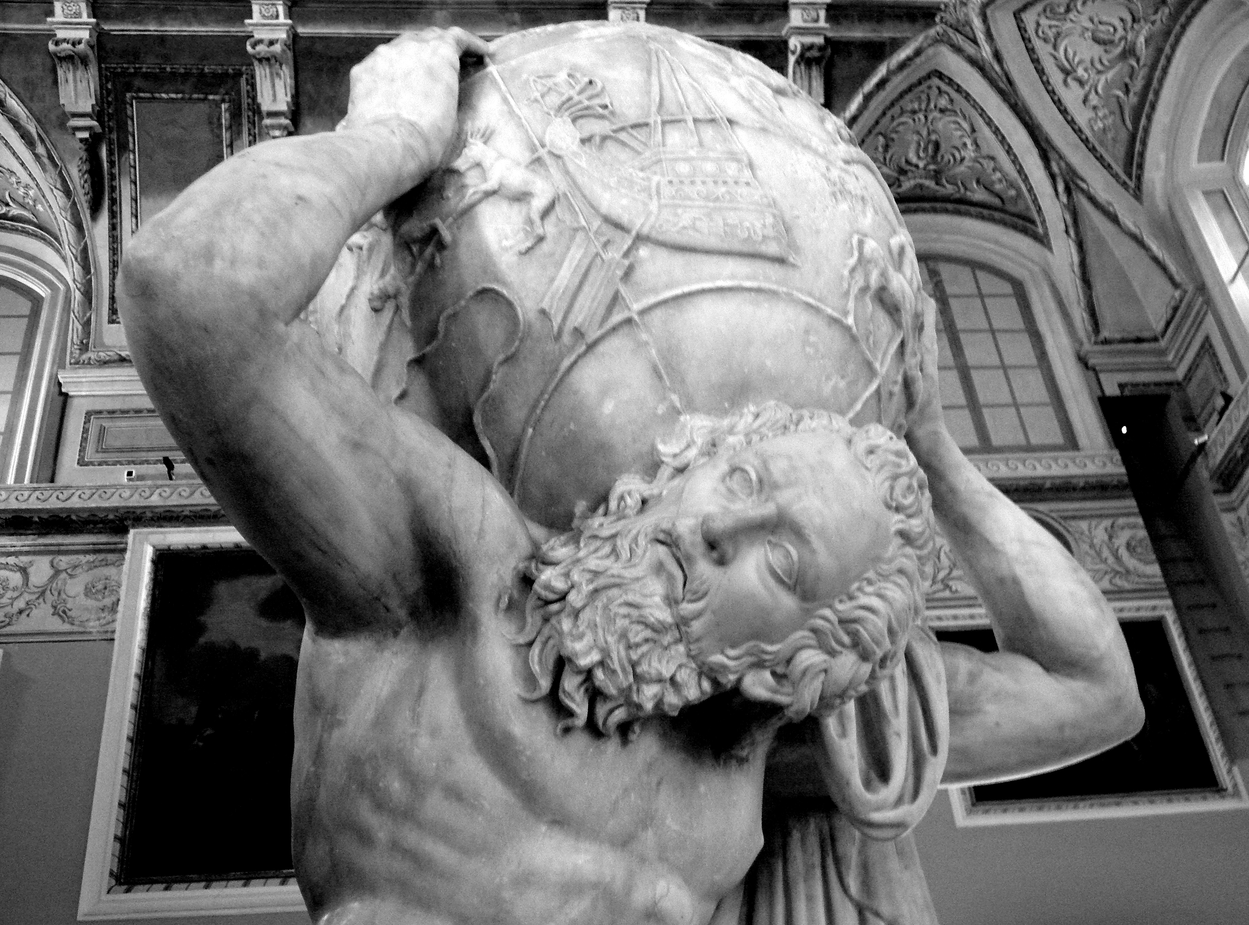 Statua romana di Atlante (sec II d.C.). Già nella Collezione Farnese, oggi al Museo Archeologico Nazionale di Napoli. Autore foto: Roberto De Martino.